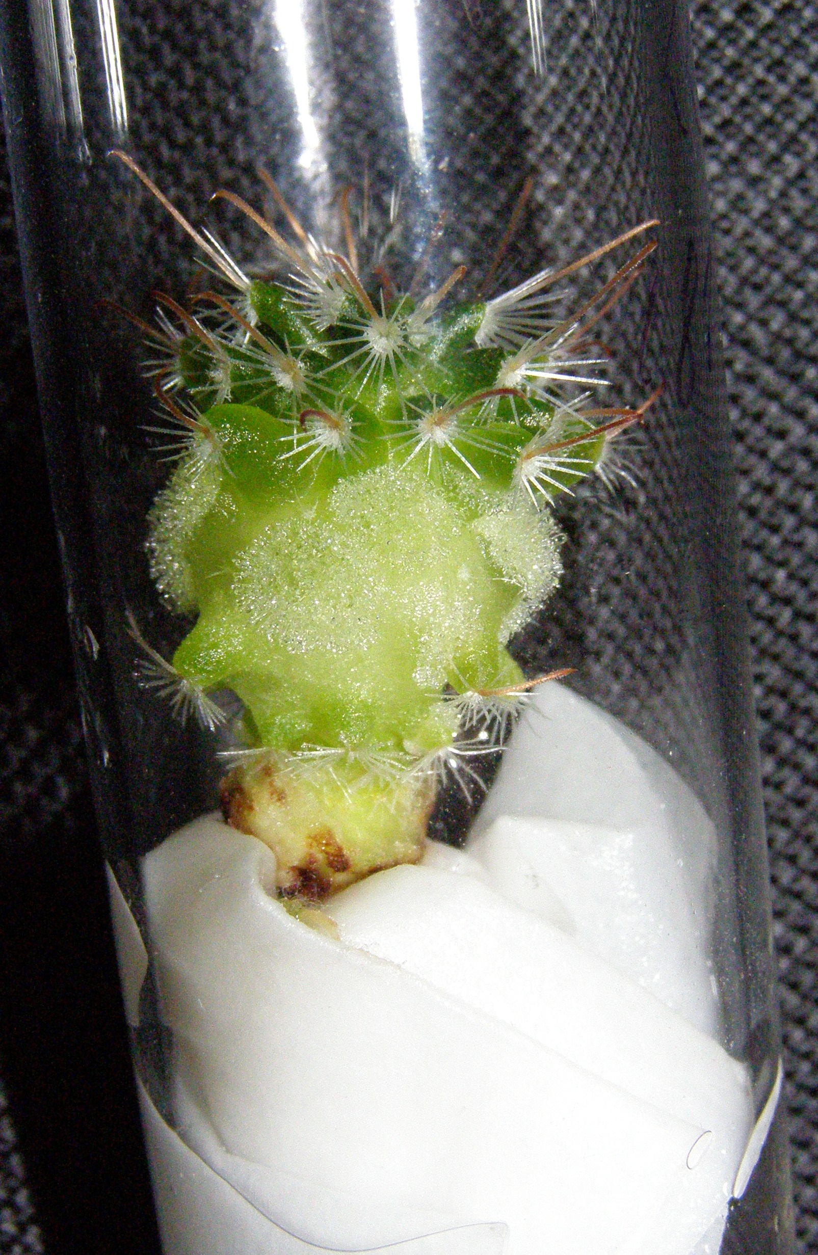 Mammillaria sp. ve zkumavce. Praha, Česká republika.